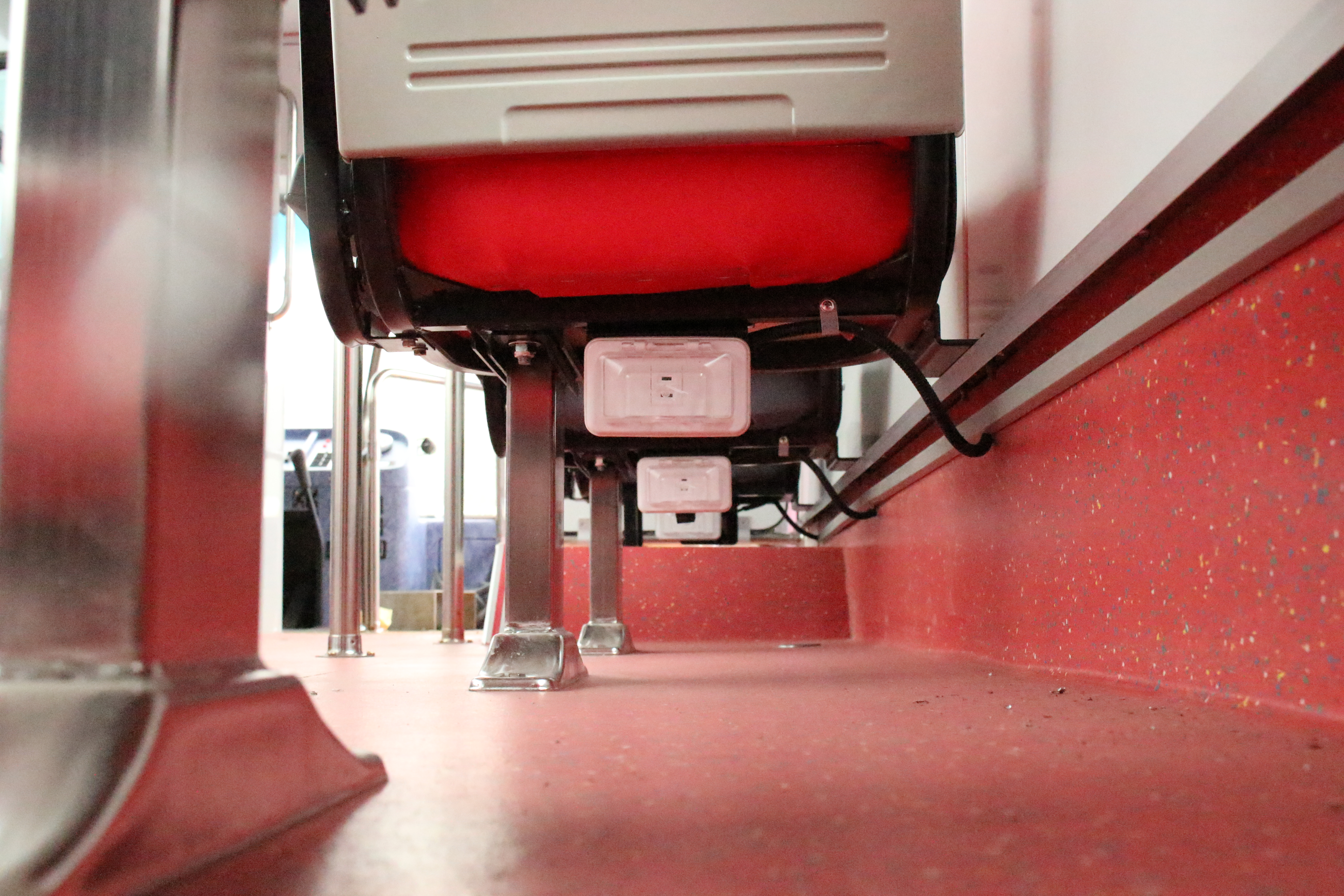 欣欣客運2016年HINO RK8JRVA-KJF一般大客車內裝座椅下配有充電設備